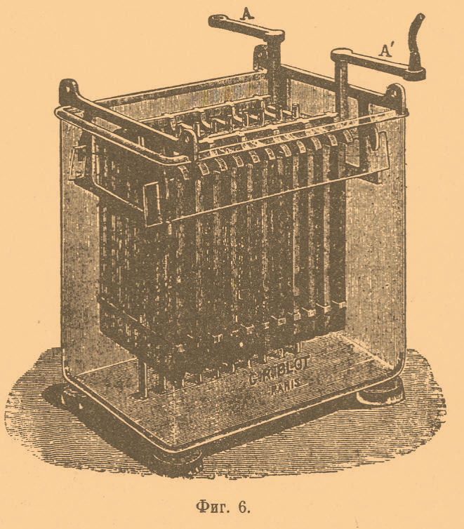 Иллюстрация к статье Электрические аккумуляторы из энциклопедии Брокгауза и Ефрона